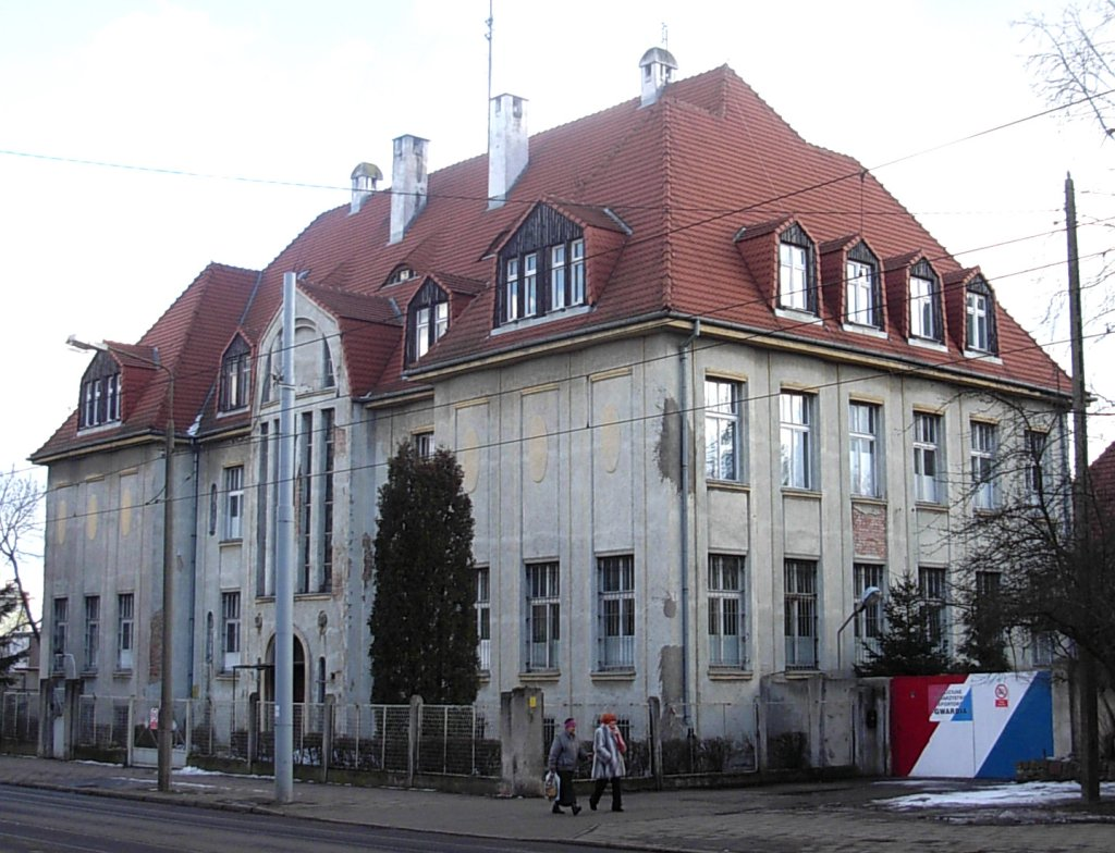 Budynek Oddziału Prewencji Policji w Bydgoszczy, 1914 r.